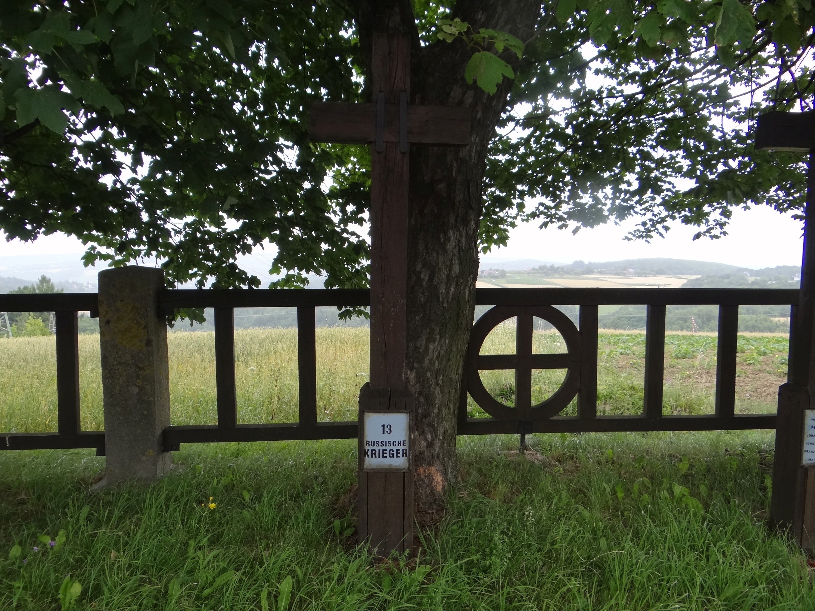 Cmentarz wojenny nr 188 Rychwałd